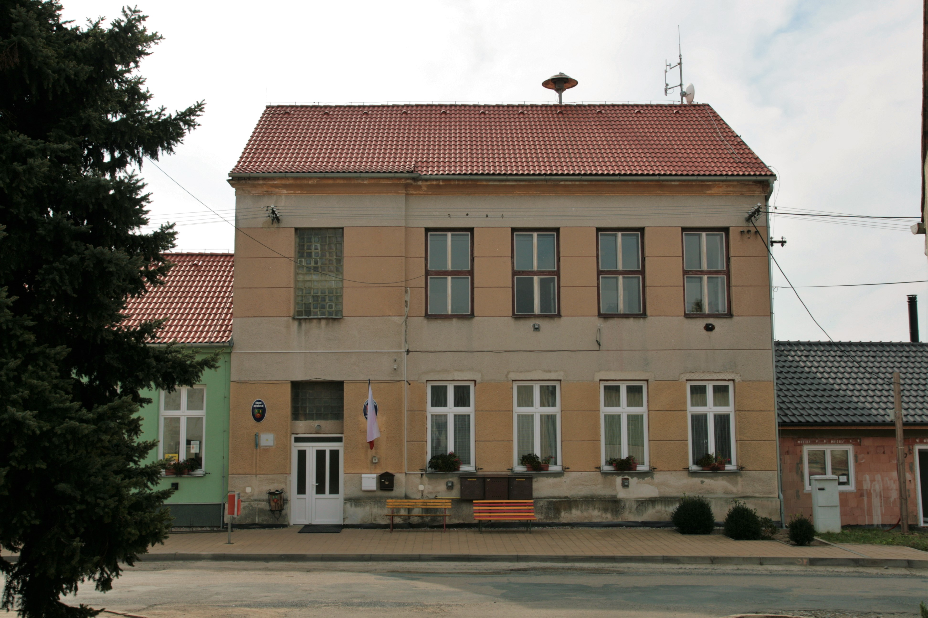 Obec Kubšice v okrese Znojmo, mezi Pohořelicemi a Moravským Krumlovem. Obecní úřad na návsti - pohled ze severu od kostela.